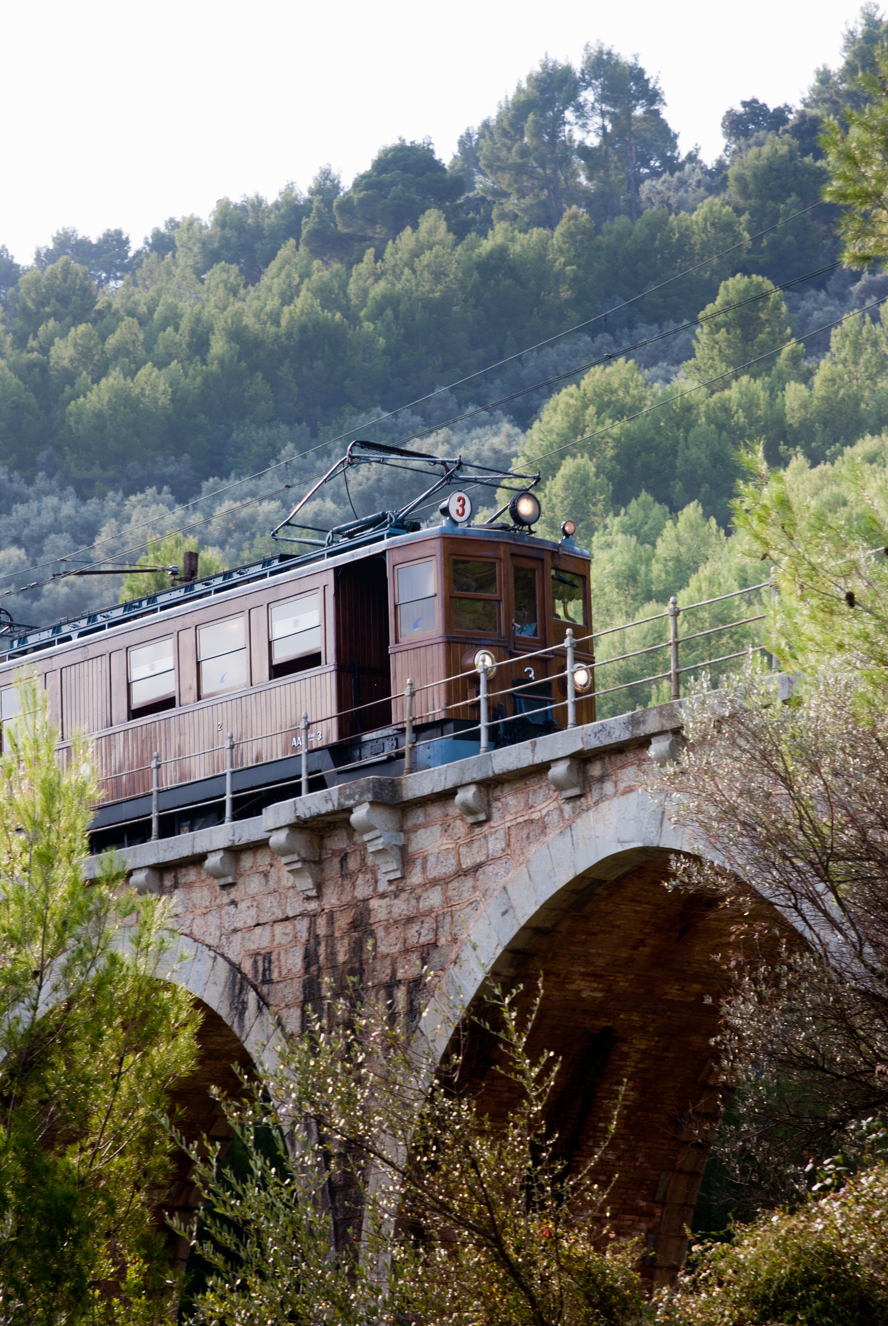 Una de las formas más auténticas de ir a Soller es usar el ferrocarril de madera que lleva desde 1912 funcionando ininterrumpidamente.